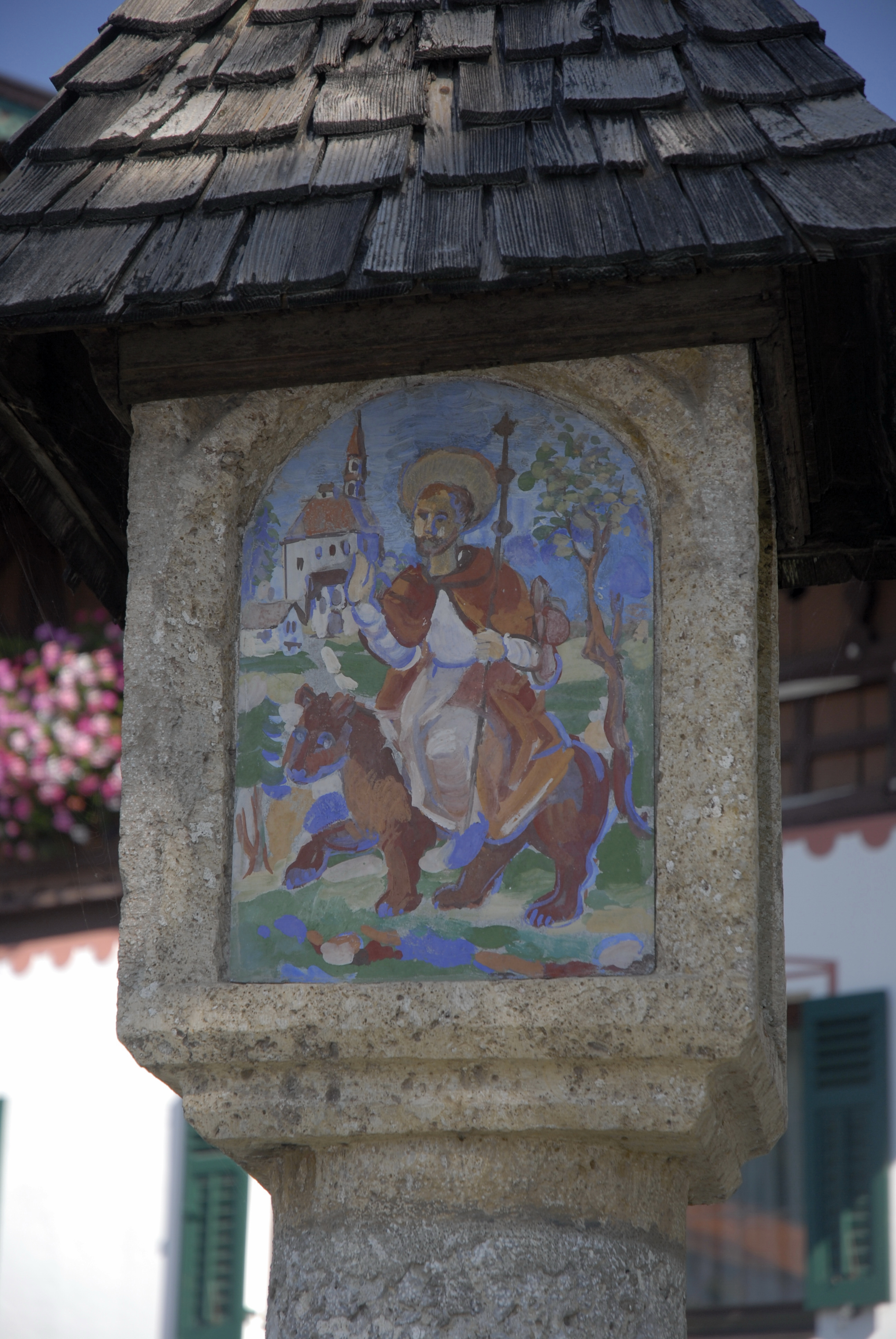 Thaur, Bildstock am Dorfplatz